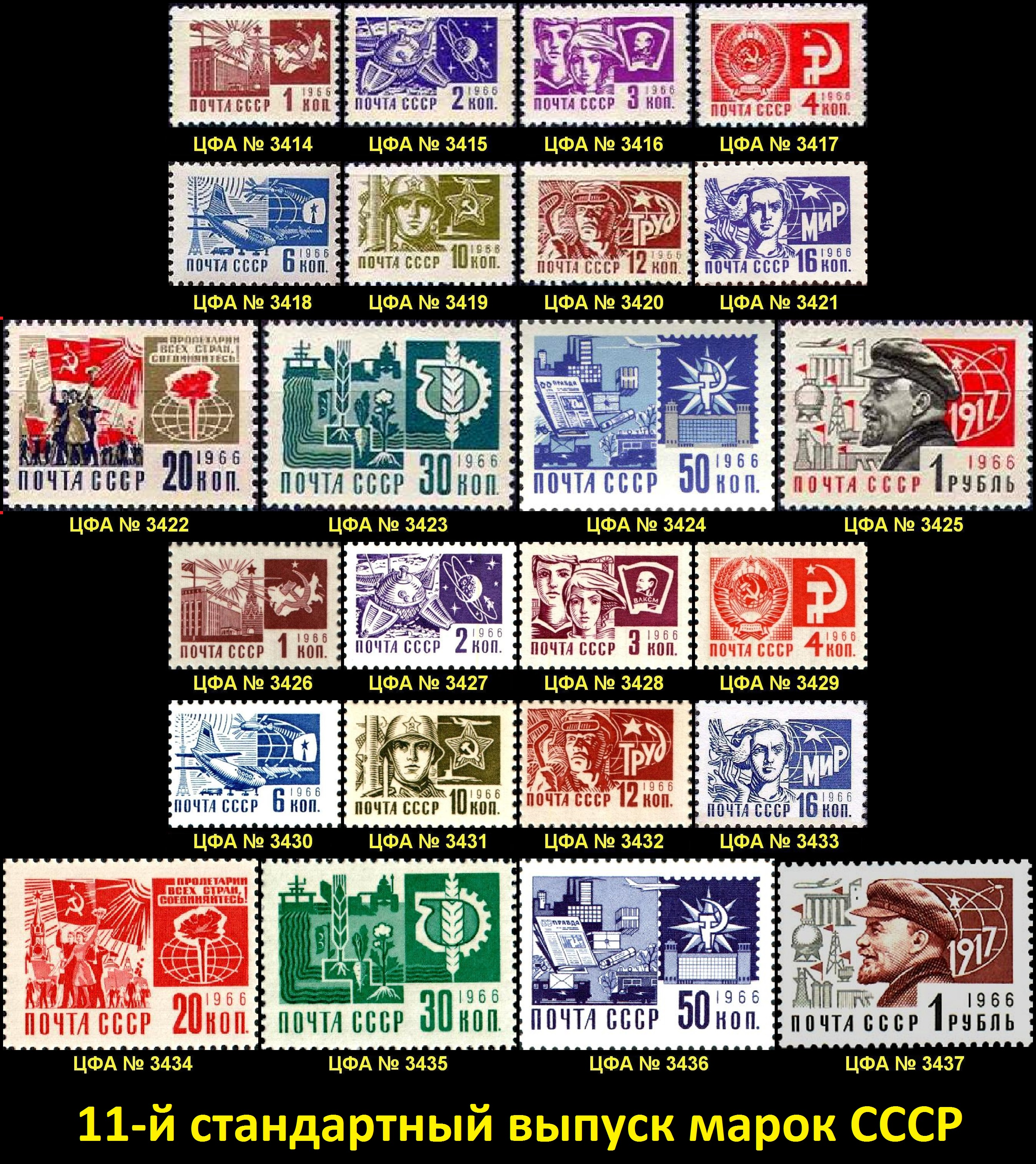 В октябре 1966 — ноябре 1969 года в обращение поступил одиннадцатый стандартный выпуск. Серия состояла из марок 12 номиналов. Для этого выпуска художник В. Завьялов выполнил новые оригинальные рисунки.